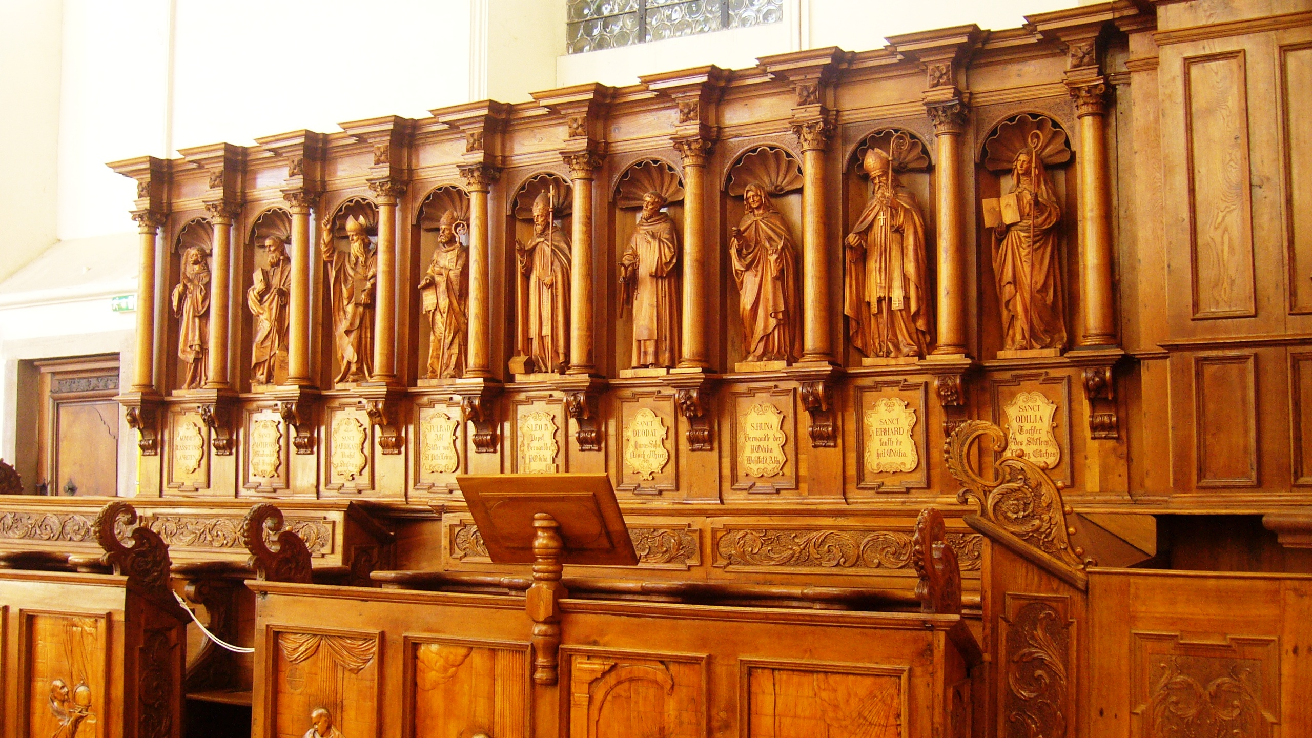 Ebersmunster 016.JPG